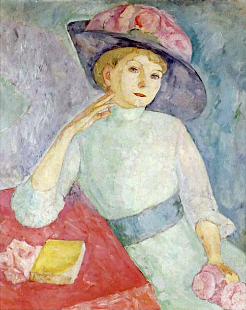 Elsa von Dardel (Nils’s sister), 1911